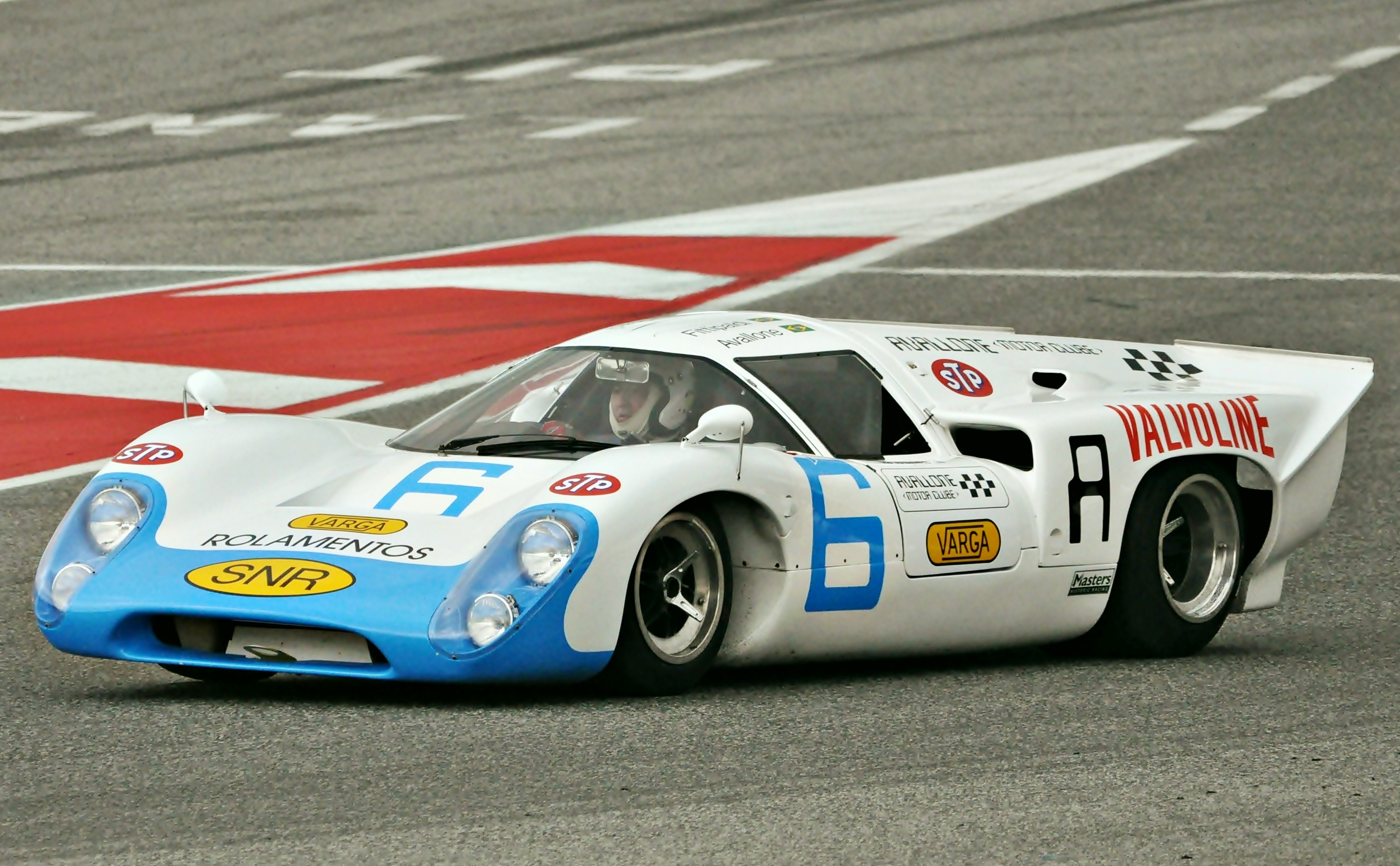 carrera master sports prototipos-circuito de cataluña